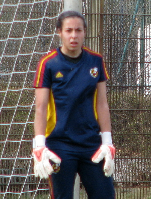 Ainhoa Tirapu de Goñi, spanische Nationalspielerin